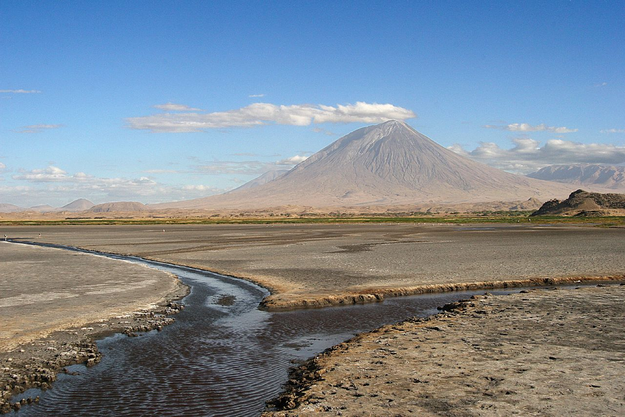 Tanzanie, Le Lengaï vu depuis le lac Natron